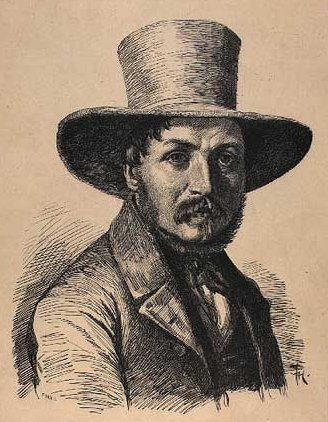 Christen Schiellerup Købke (26.05.1810–07.02.1848), dansk kunstmaler